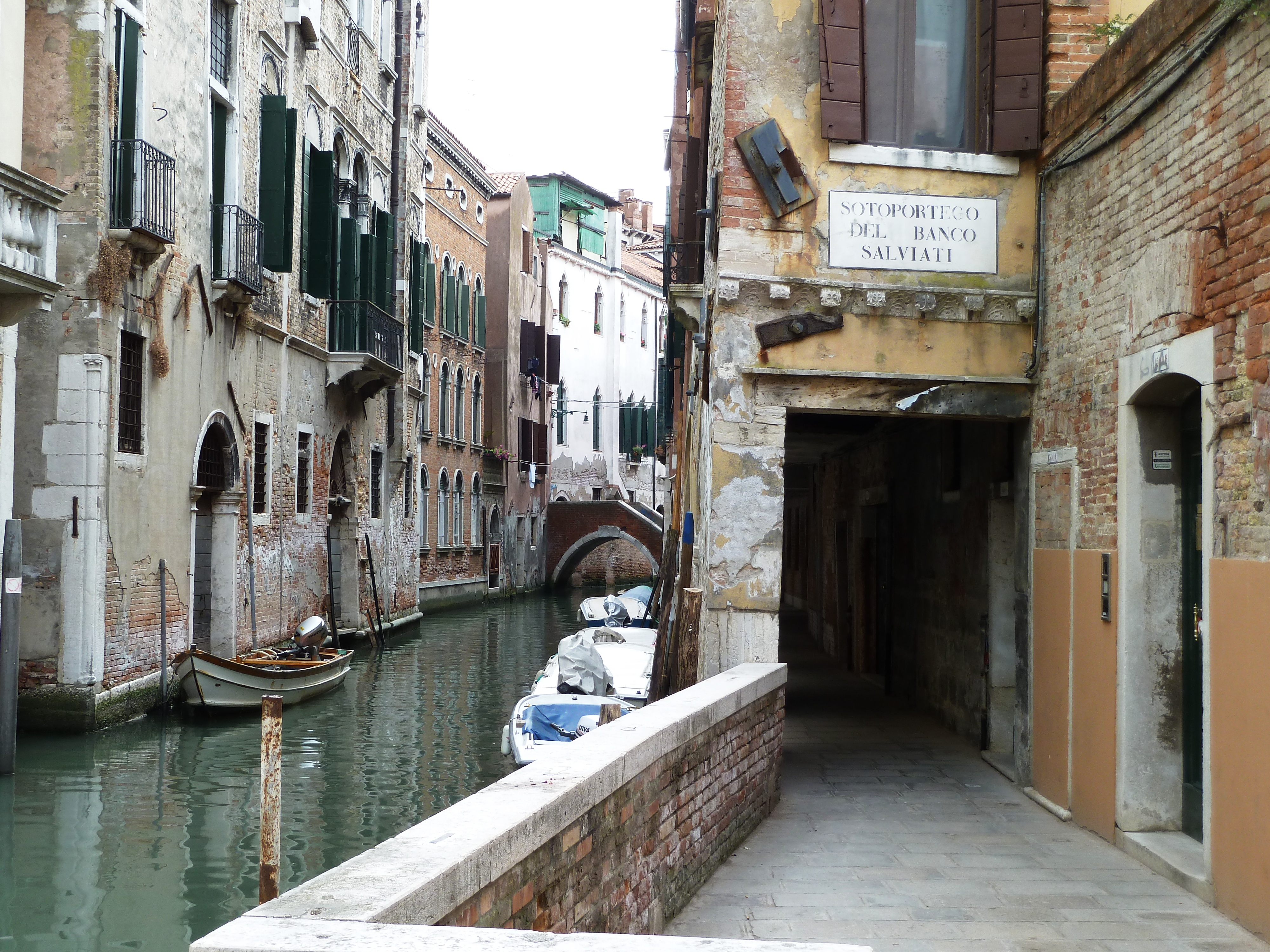 Rio di S.Aponal (Venice)